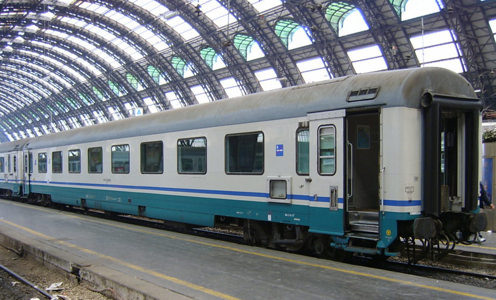 Trenitalia IC 1. Class, Milano Centrale